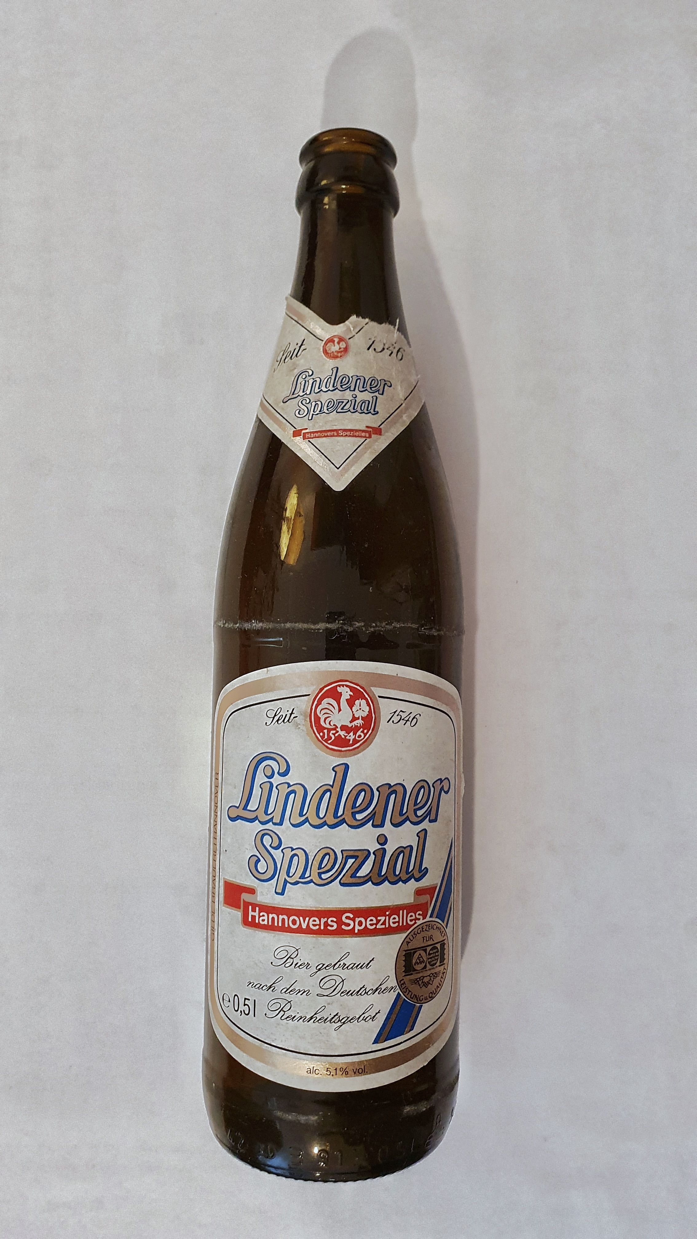 Altes Bieretikett der Lindener Brauerei von 1998.